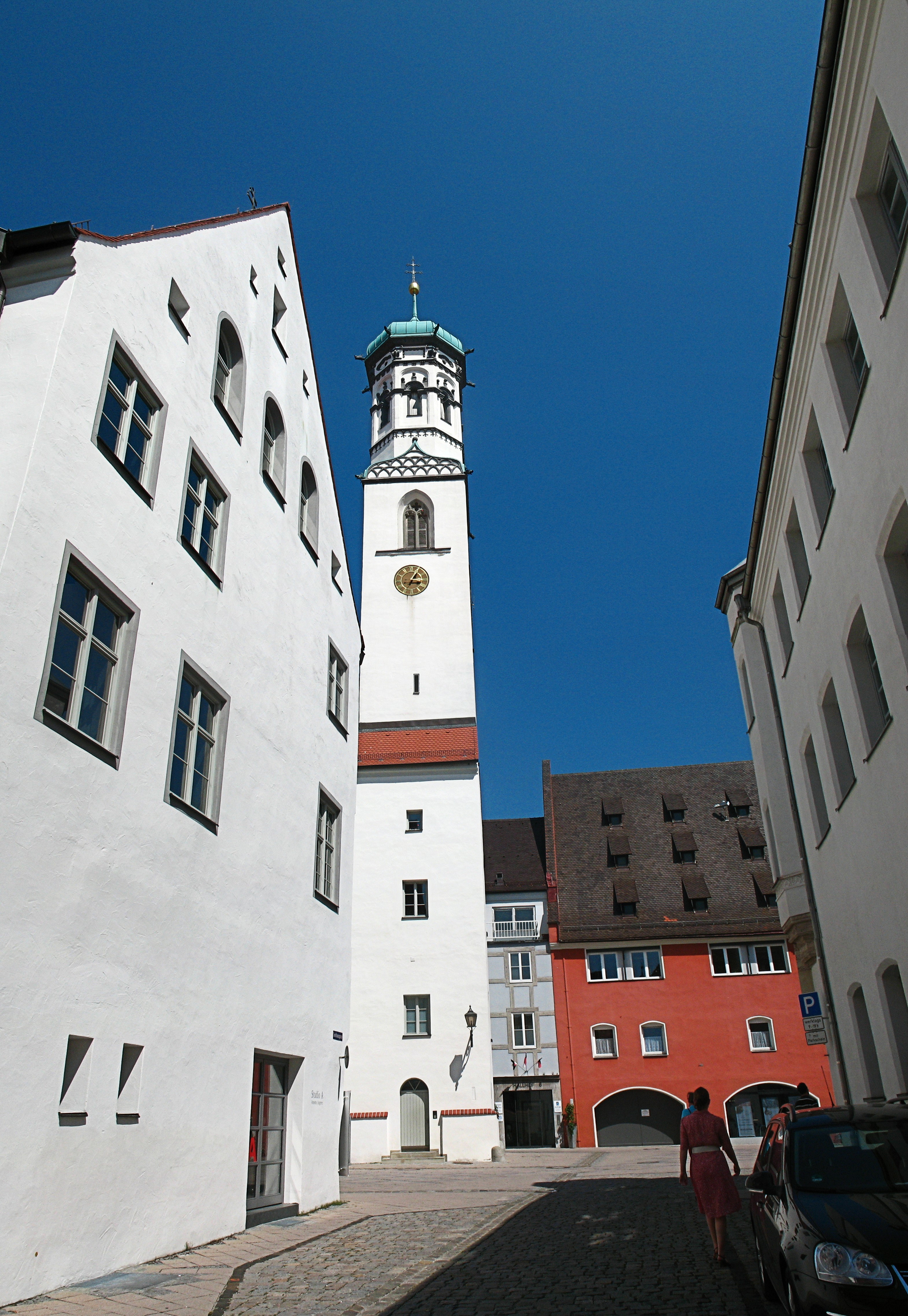 Deutschland, Bayern, Memmingen, Kreuzherrenklosterkirchturm, Panorama